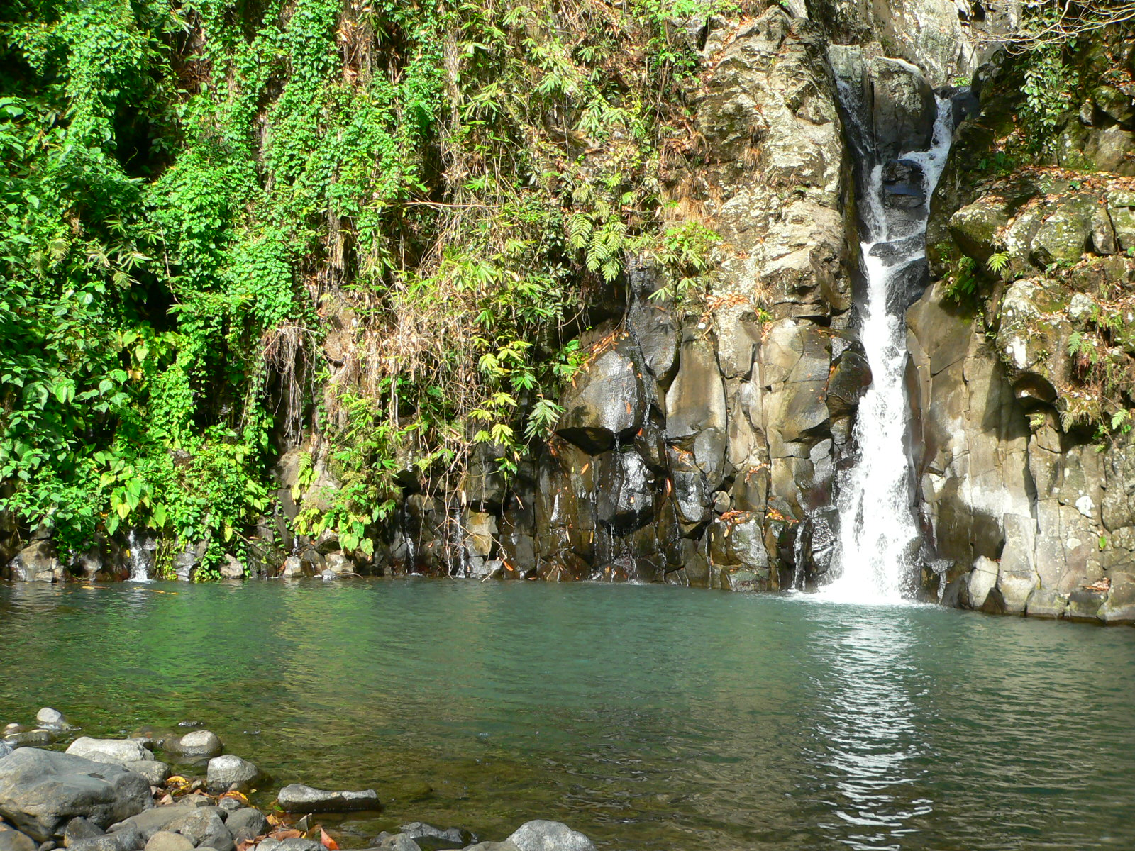 Tagalog: isa sa mga talon na matatagpuan sa bundok kanlaon,negros occidental.